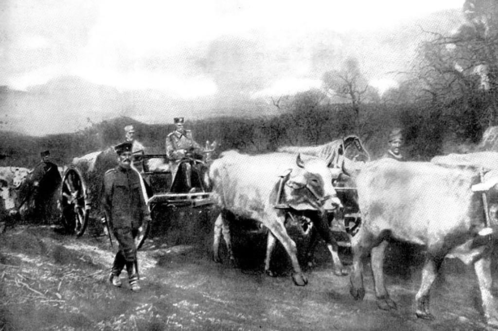 Kralj Petar I Karađorđević, slika Vladimira Becića